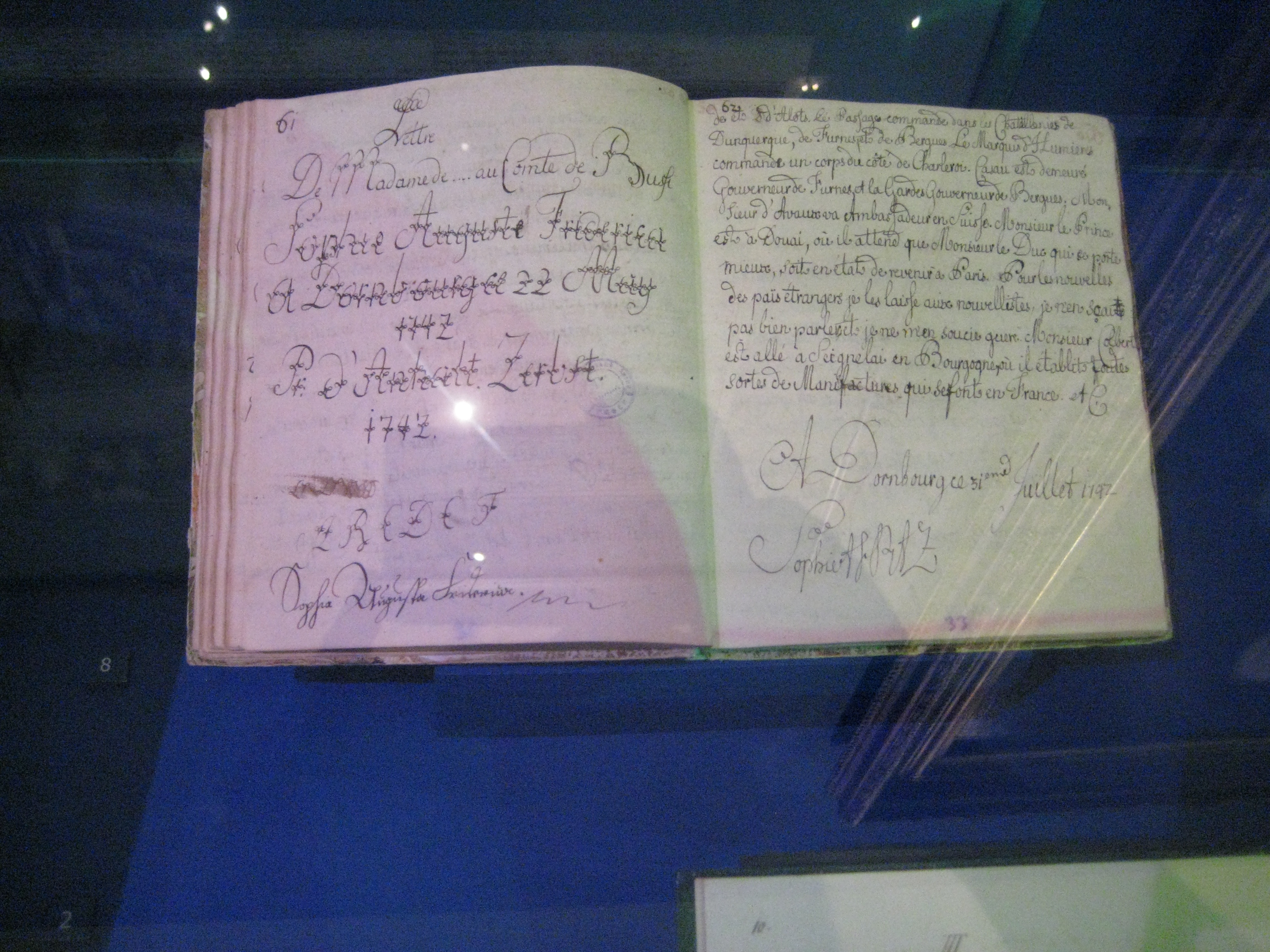 Письменные упражнения в каллиграфии и французском языке принцессы Софии Ангальт-Цербской. Германия, Дюрнбург, 1742. Автограф. Государственный архив Российской Федерации. Тетрадь начата в апреле 1742 в родовой резиденции. В 1782 году Екатерина подарила ее своему фавориту А.Д. Ланскому. В 1806 г. Я.А. Дружинин, чиновник императорской канцелярии, приобрел ее у М..А. Ал (нрзб) и передал на хранение в Библиотеку зимнего дворца.